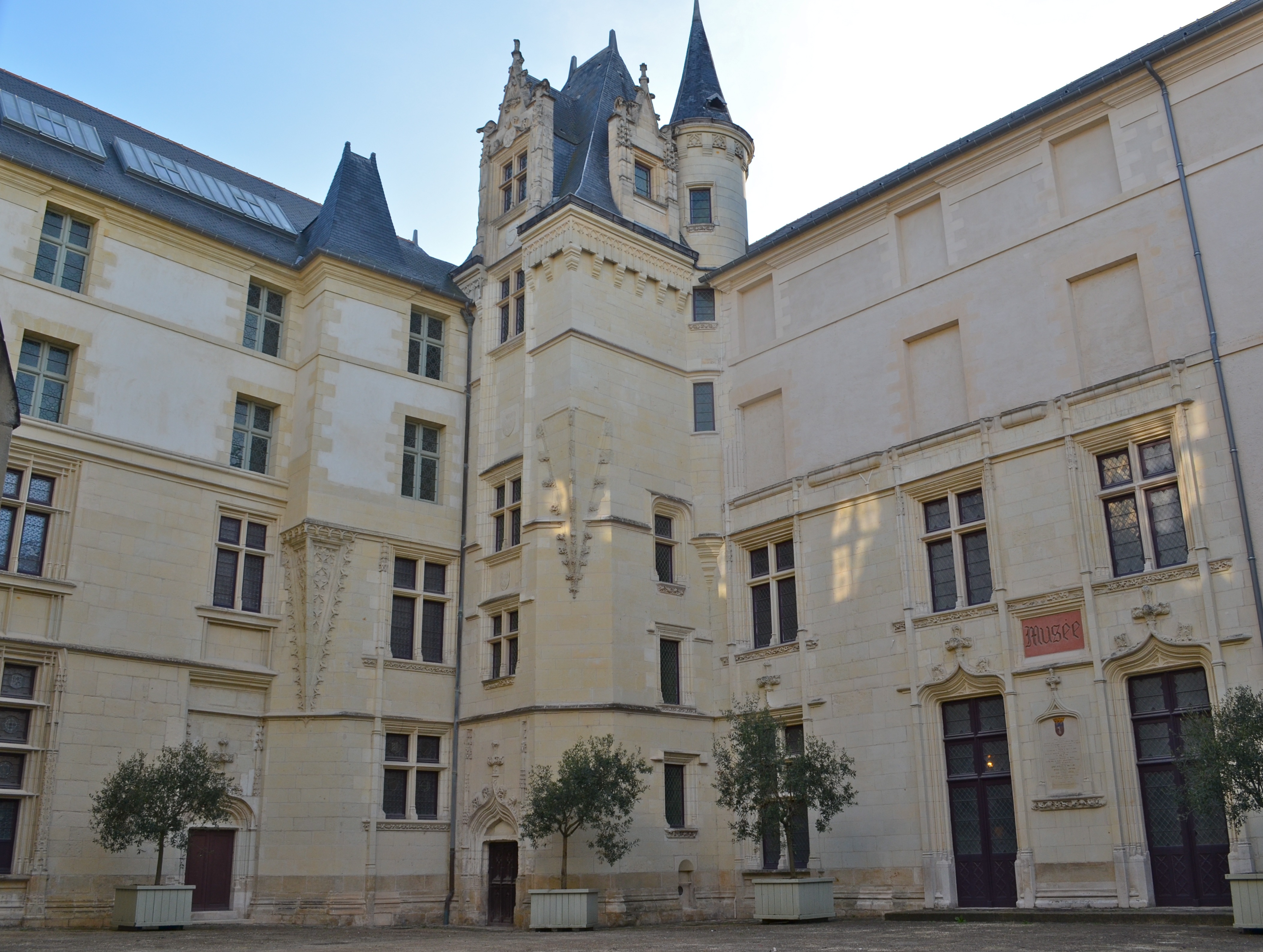 Logis Barrault, actuel musée des beaux-arts - Angers (Maine-et-Loire)